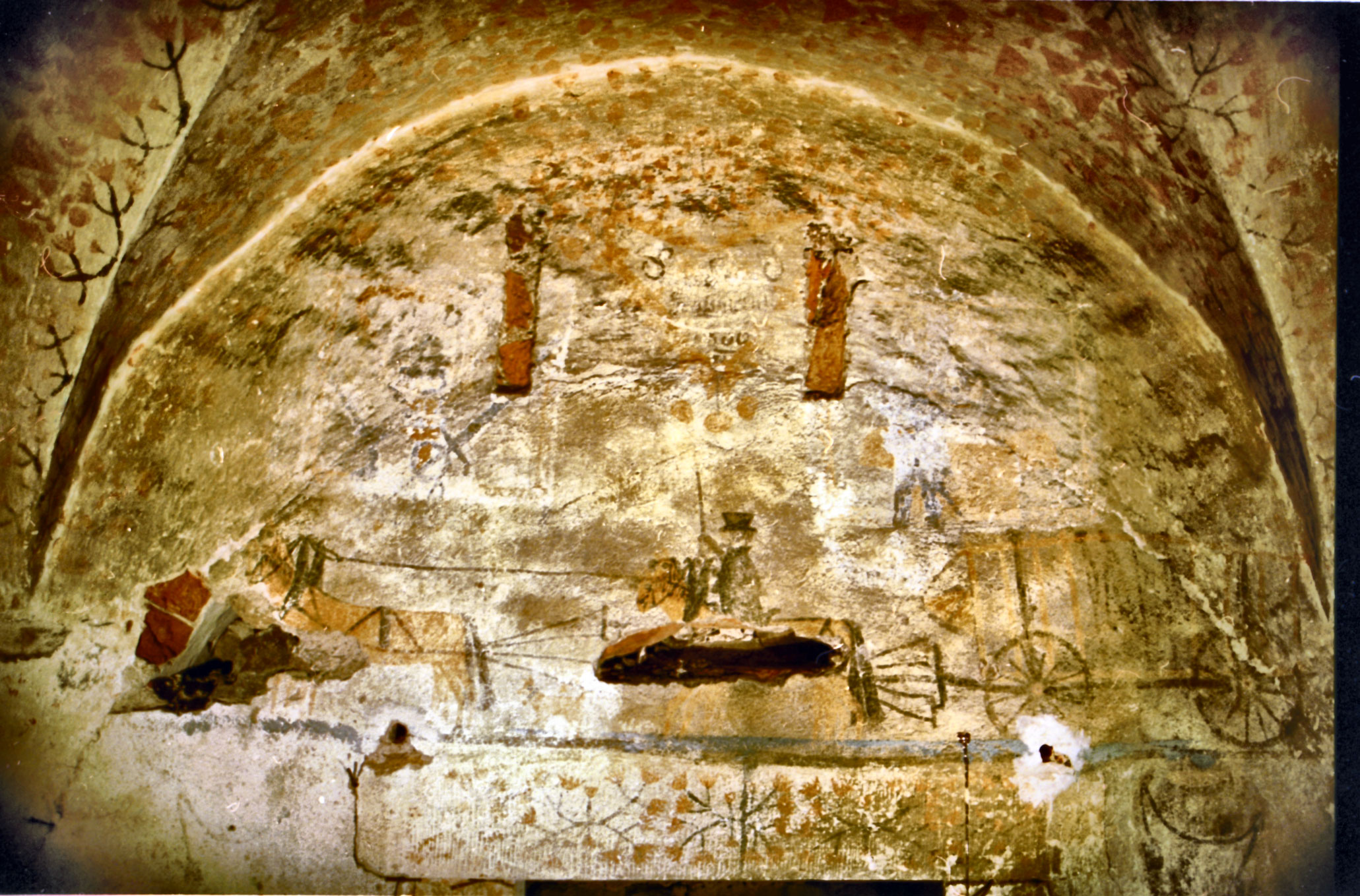 Laienmalereien Schloß Noschkowitz